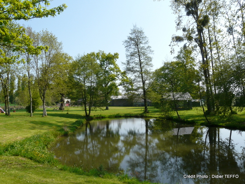 Vue des étangs du jardin public de Nozay en Loire-Atlantique